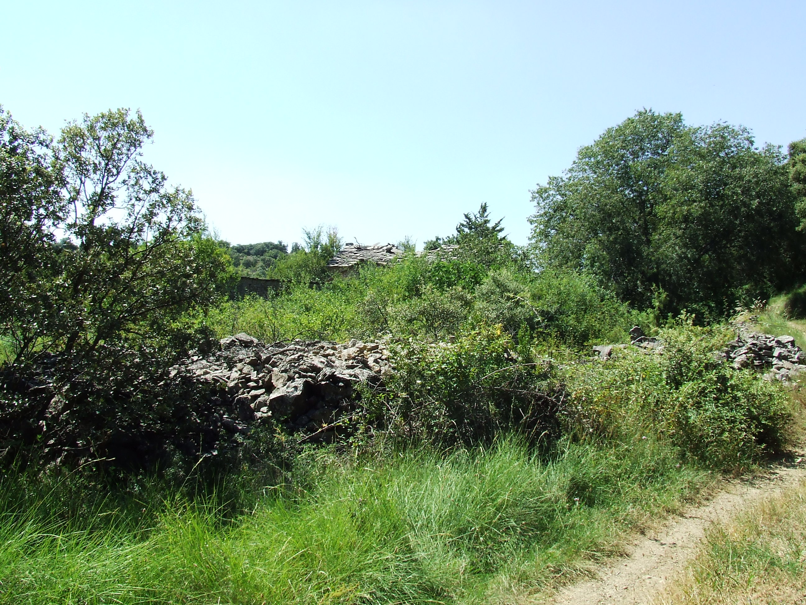 Sellamana (el Meüll, Mur, Castell de Mur, Pallars Jussà)